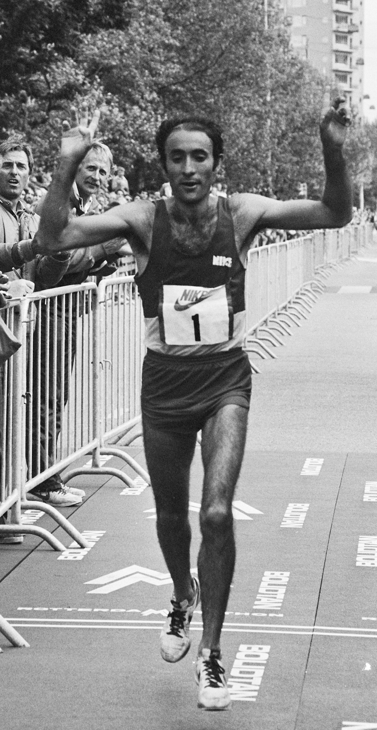 Tweede Rotterdam marathon; Mexicaan Rodolfo Gomez (winnaar) over de finish.